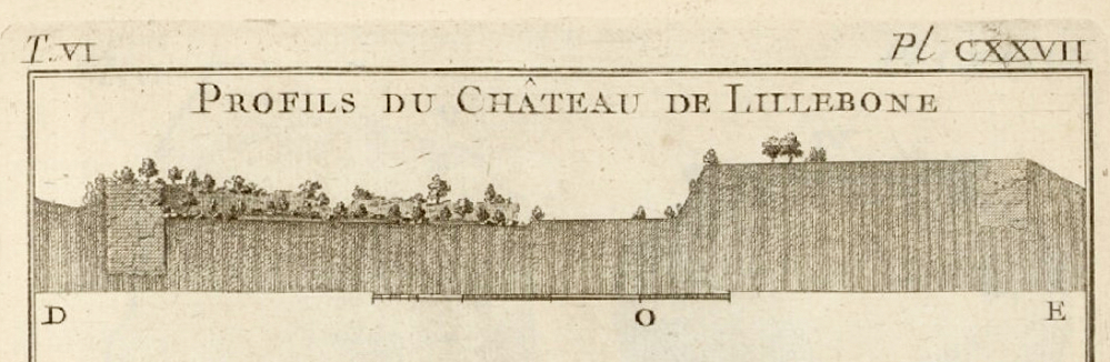 Coupe du théâtre de Lillebonne du sud (D) au nord (E) Extrait du "Recueil d’Antiquités égyptiennes, étrusques, grecques, romaines et gauloises", t. VI